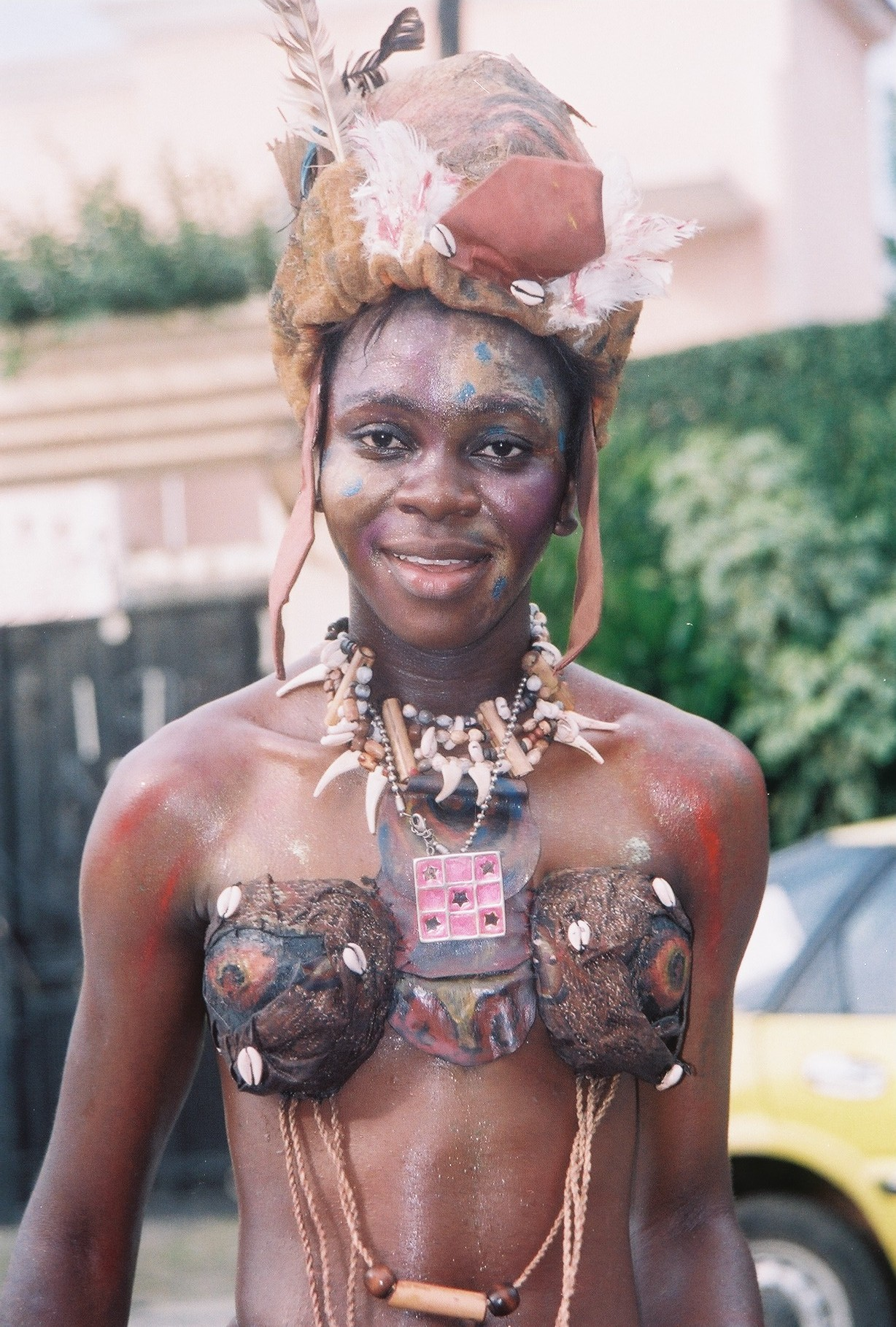 Pendant un carnaval... à Bonapriso (Cameroun) This is an image of Cultural Fashion or Adornment from Cameroon